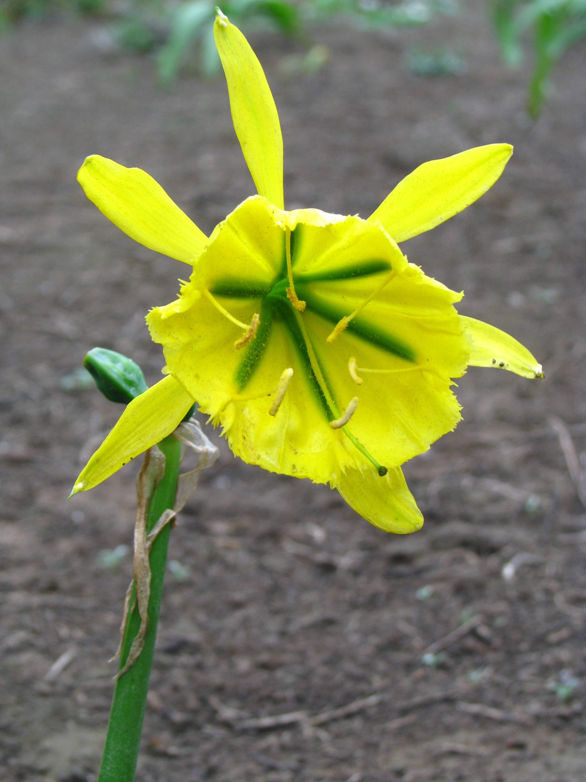 Fotografía de la flor de amancaes, flor típica de las lomas de Lima, capital del Perú, cuyo nombre científico es Ismene amancaes.